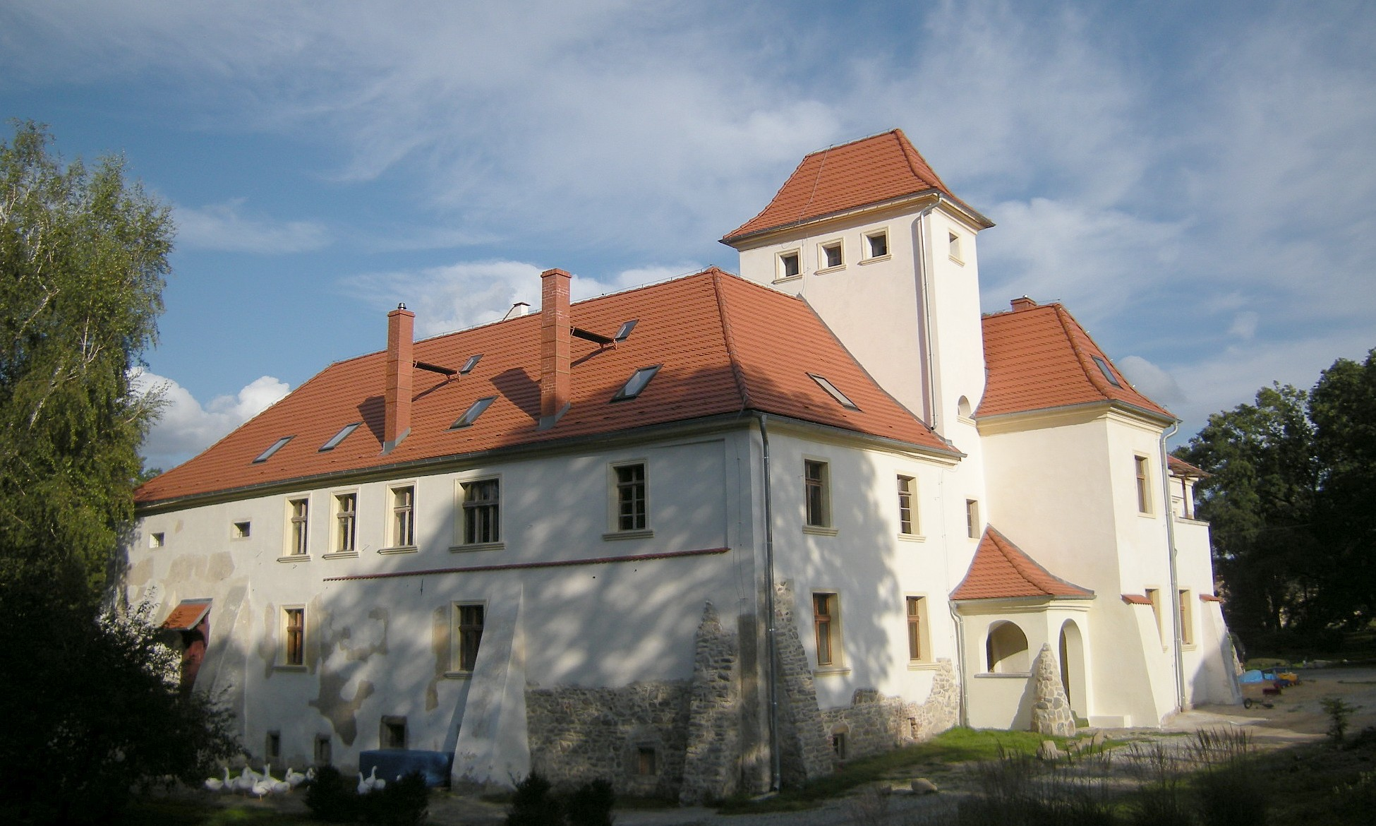 pałac (dec. dwór) Piotrowice Nyskie, Otmuchów 03.1966.